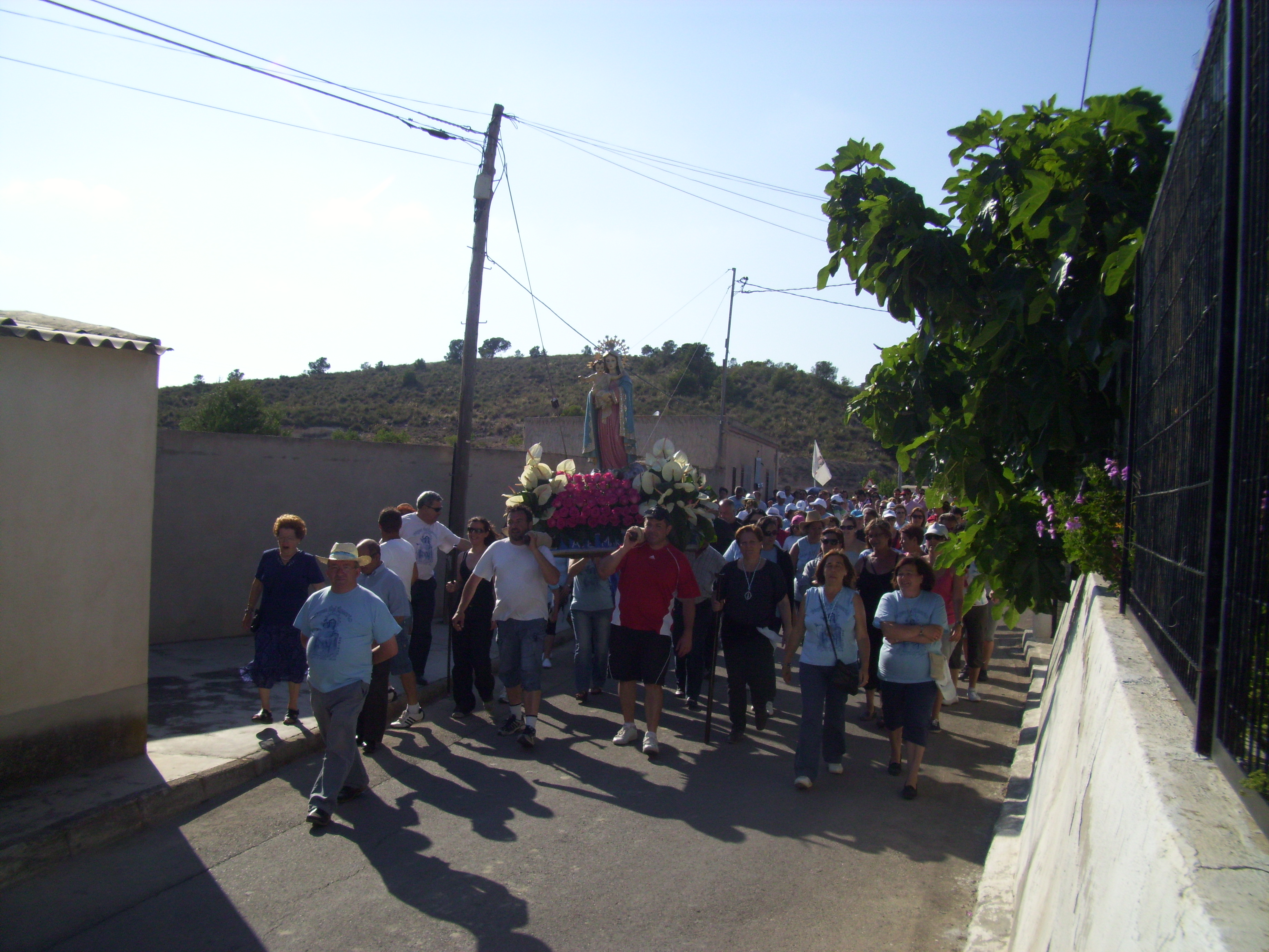 Fotografía correspondiente a la romería del año 2011. Virgen del Rosario volviendo a la Iglesia llevada por barineros7as